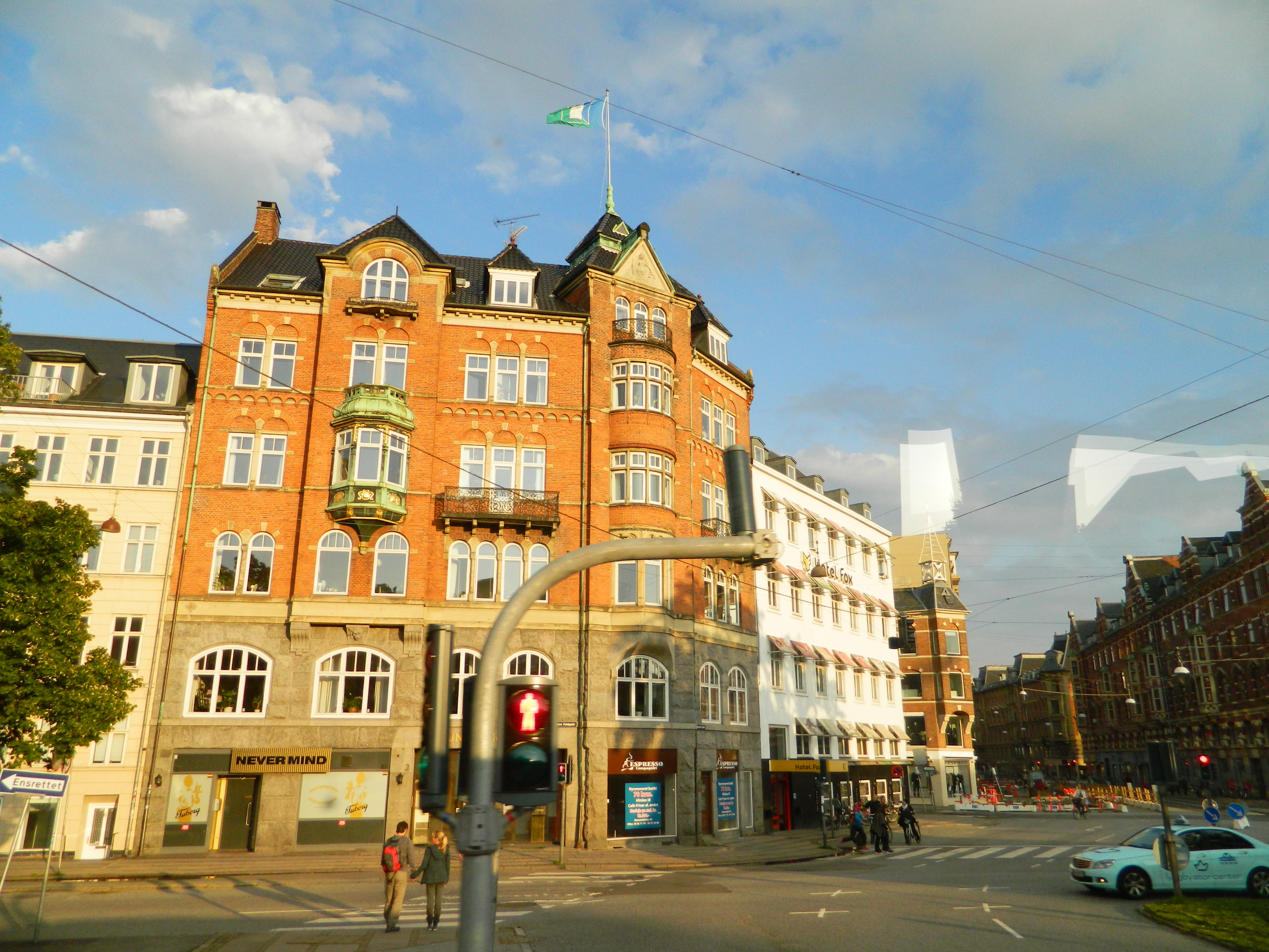 Copenhagen